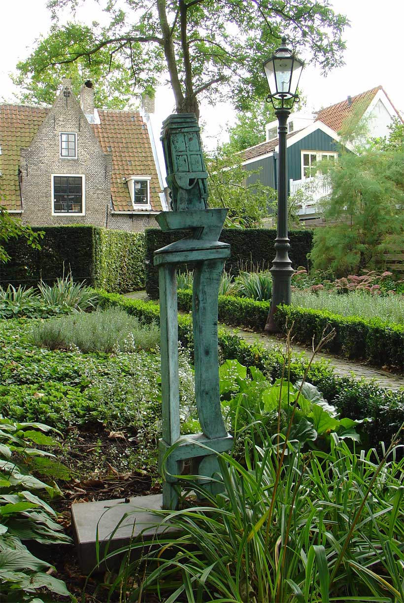 Le coeur à ses raisons que la raison ne connait pas (1991), brons, door Eduard Wind (1947) - Hof van Jansenius Gouda